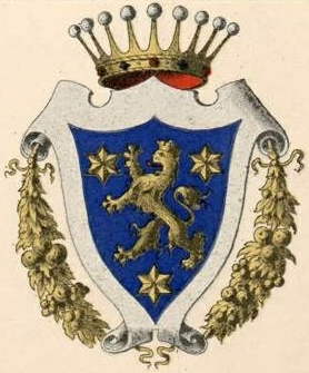 Guillemot de Villebois´ suguvõsa aadlivapp